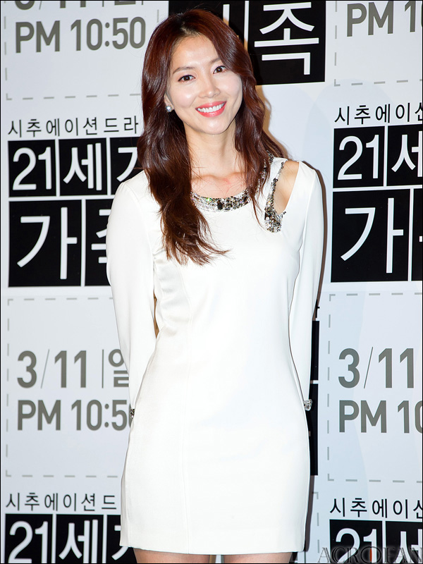 tvN 드라마 21세기 가족 제작 발표회에 참석한 오윤아